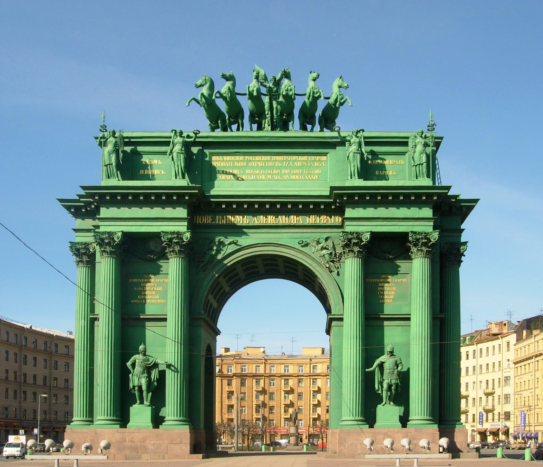 Нарвские ворота на площади Стачек.